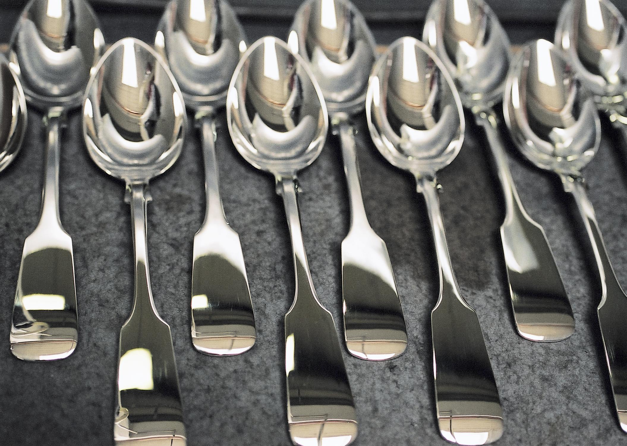 Löffel des Besteckmodells Spaten